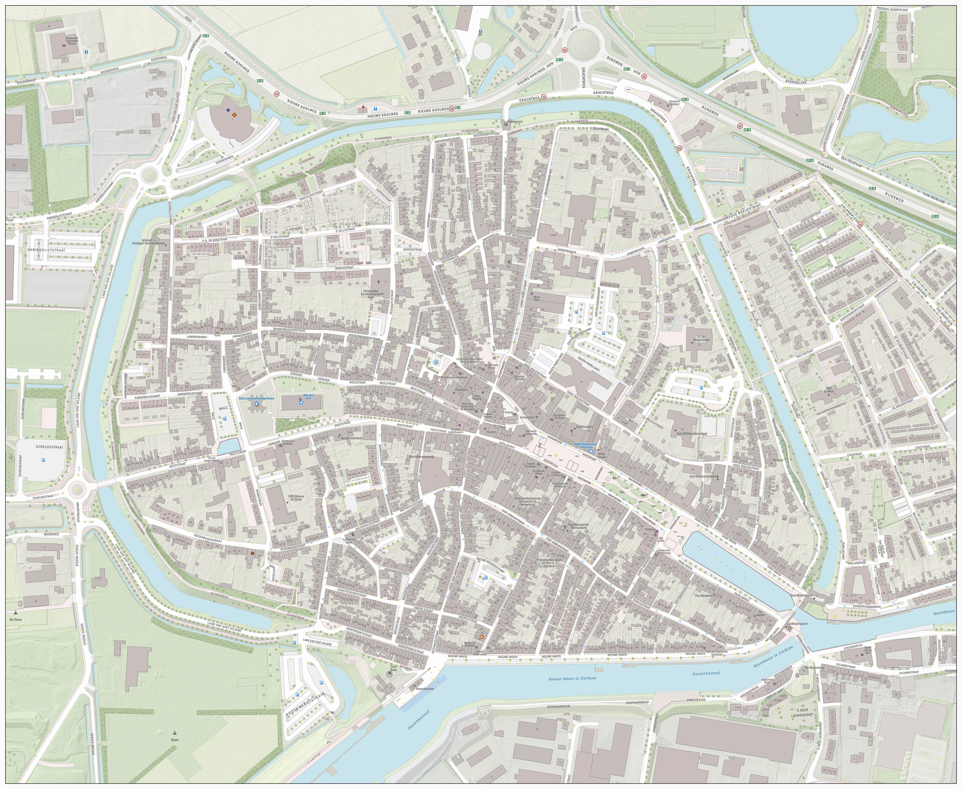 Topografische kaart van Zierikzee (centrum van woonplaats). Resolutie: 2688 pixels/km. Kaartbeeld samengesteld uit de open geodata van de Basisregistratie Grootschalige Topografie (BGT), Creative Commons-BY Kadaster, en Top10NL en Top25namen (Basisregistratie Topografie, Kadaster), Creative Commons-BY Kadaster. Gebouwvlakken uit open geodata BAG extract, Creative Commons-BY Kadaster. Wegen uit de OpenStreetMap, CC-BY OpenStreetMap bijdragers. Reliëfschaduw uit de Actuele Hoogtekaart AHN2/AHN3. Samenstelling en kleurenschema: Jan-Willem van Aalst, met QGIS2. Zie ook de Legenda.